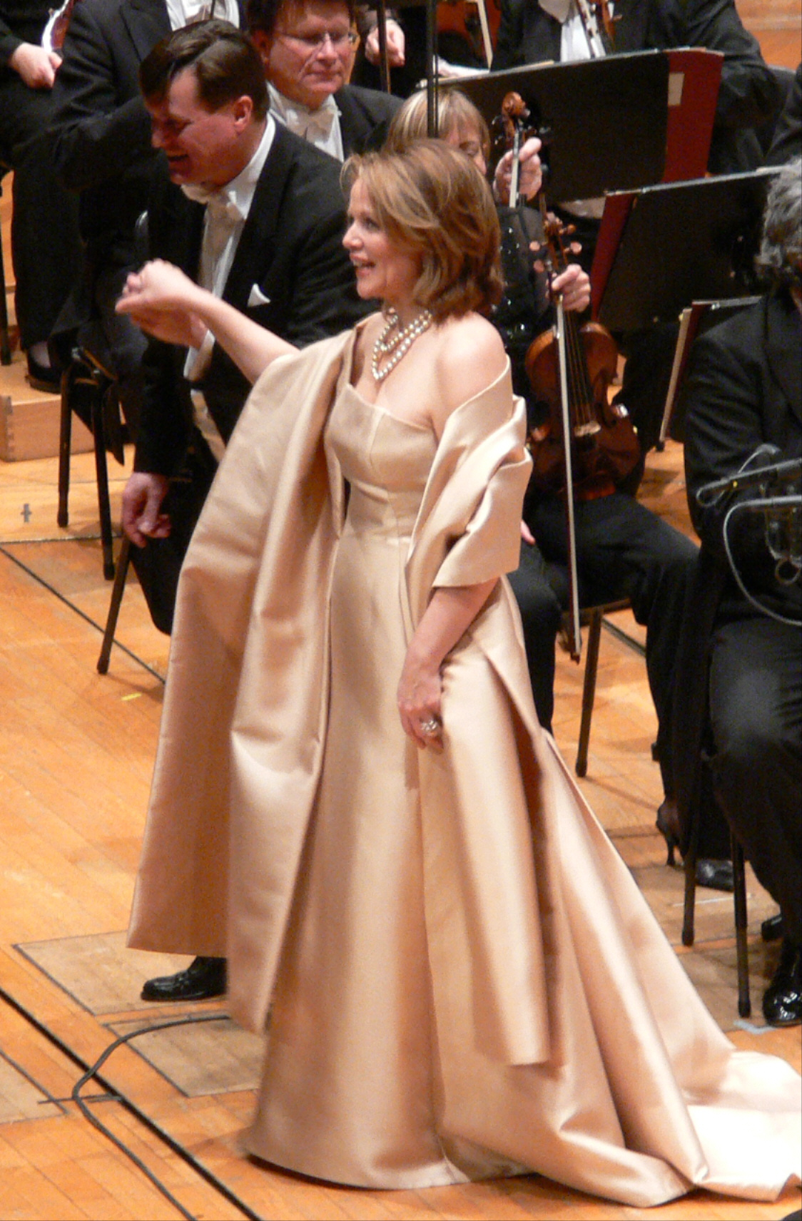 Renée Fleming und Christian Thielemann, nach einem Konzert in der Philharmonie im Gasteig